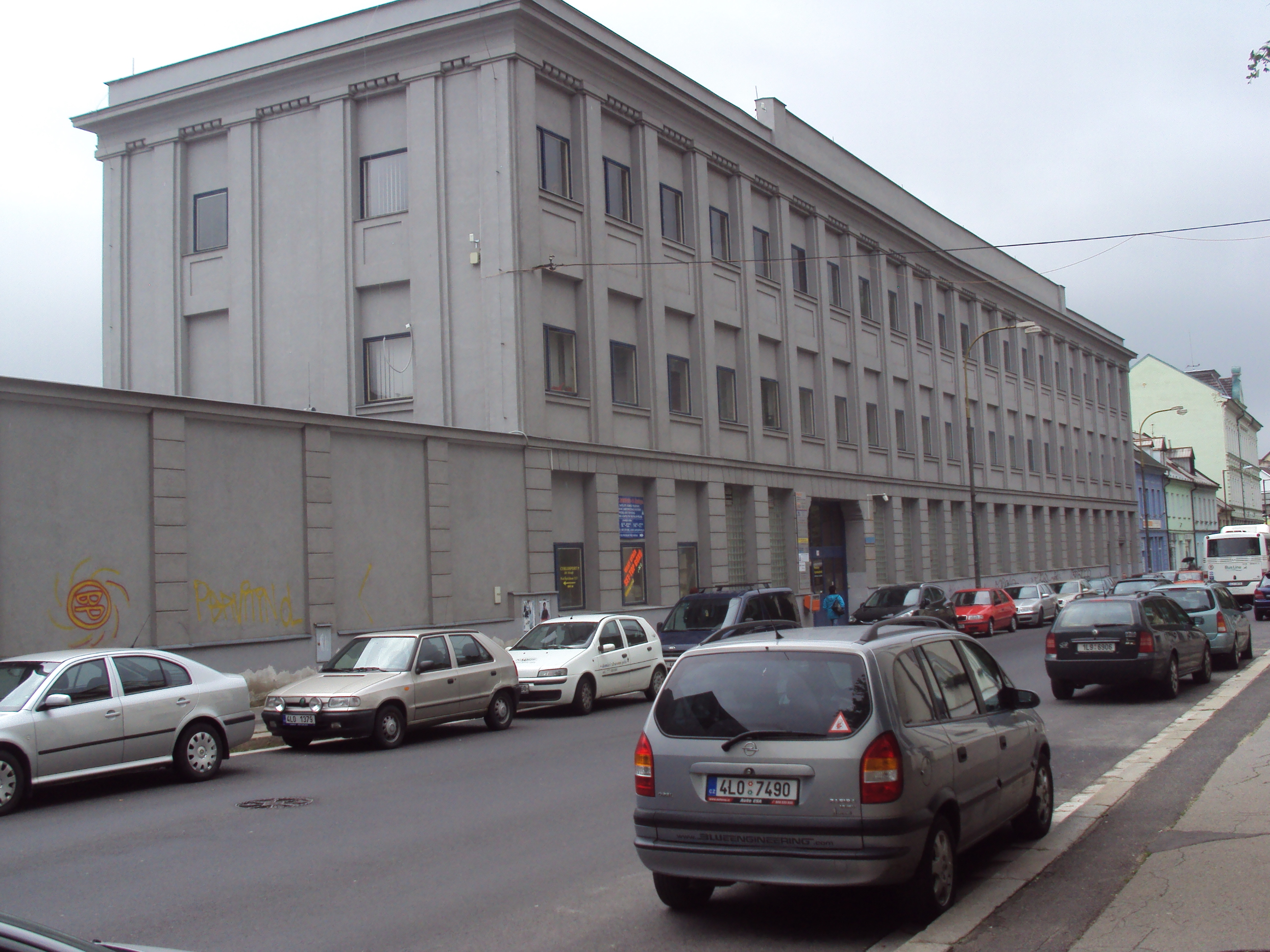 Jedna z budov Narexu v Moskevské